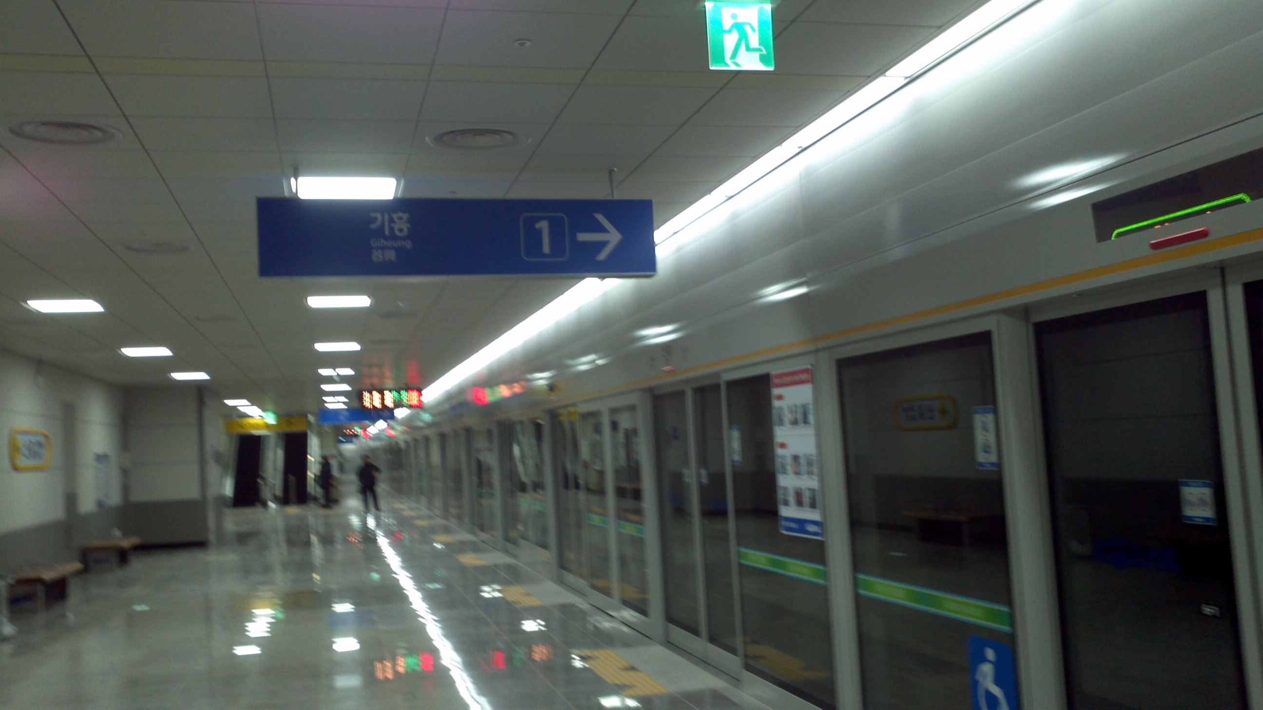 신갈역 1번 승강장